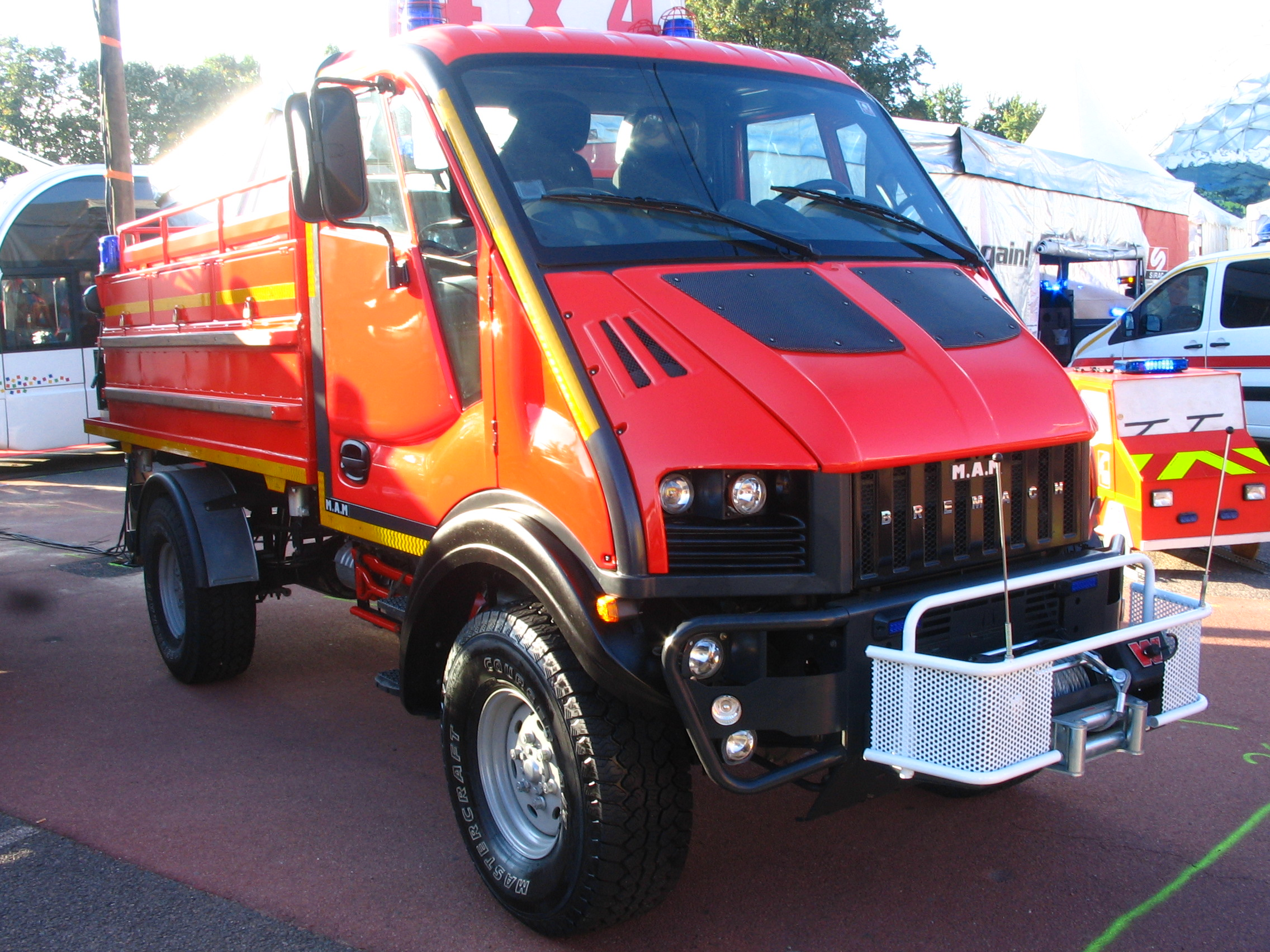 Camion Bremach exposé lors du 116e Congrès national des sapeurs-pompiers (15-17 octobre 2009) - Parc expo Plaine Achille, St-Etienne, Loire.